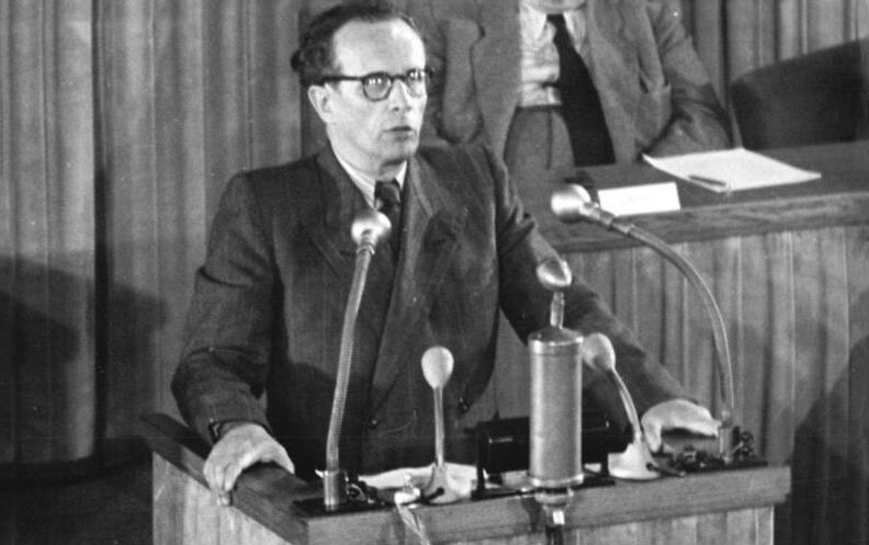 Illus-Sturm 15.9.1951- Ausserordentliche Volkskammersitzung Am 15.9.1951 fand im Haus der Volkskammer in Berlin eine Ausserordentliche Sitzung der Volkskammer statt, auf der Ministerpräsident Grotewohl eine Regierungserklärung abgab. UBz: Für die NDPD sprach Vincenz Müller.